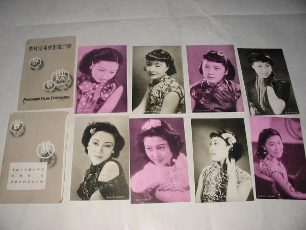 中文（台灣）: 滿映明星照片集。